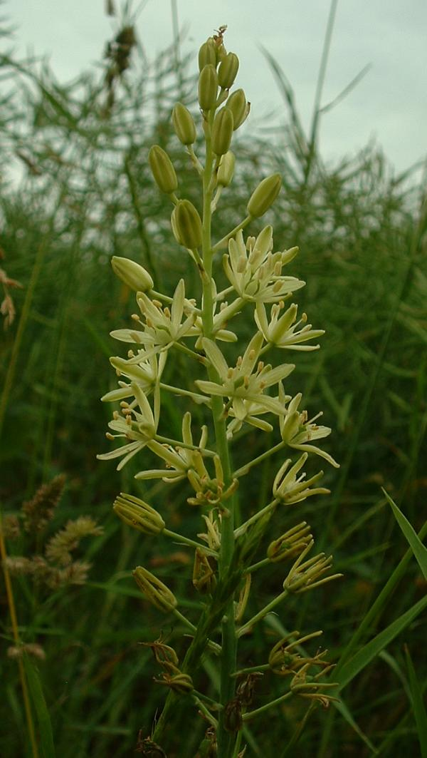 Ornithogale des Pyrénées,Vellefrey-et-Vellefrange